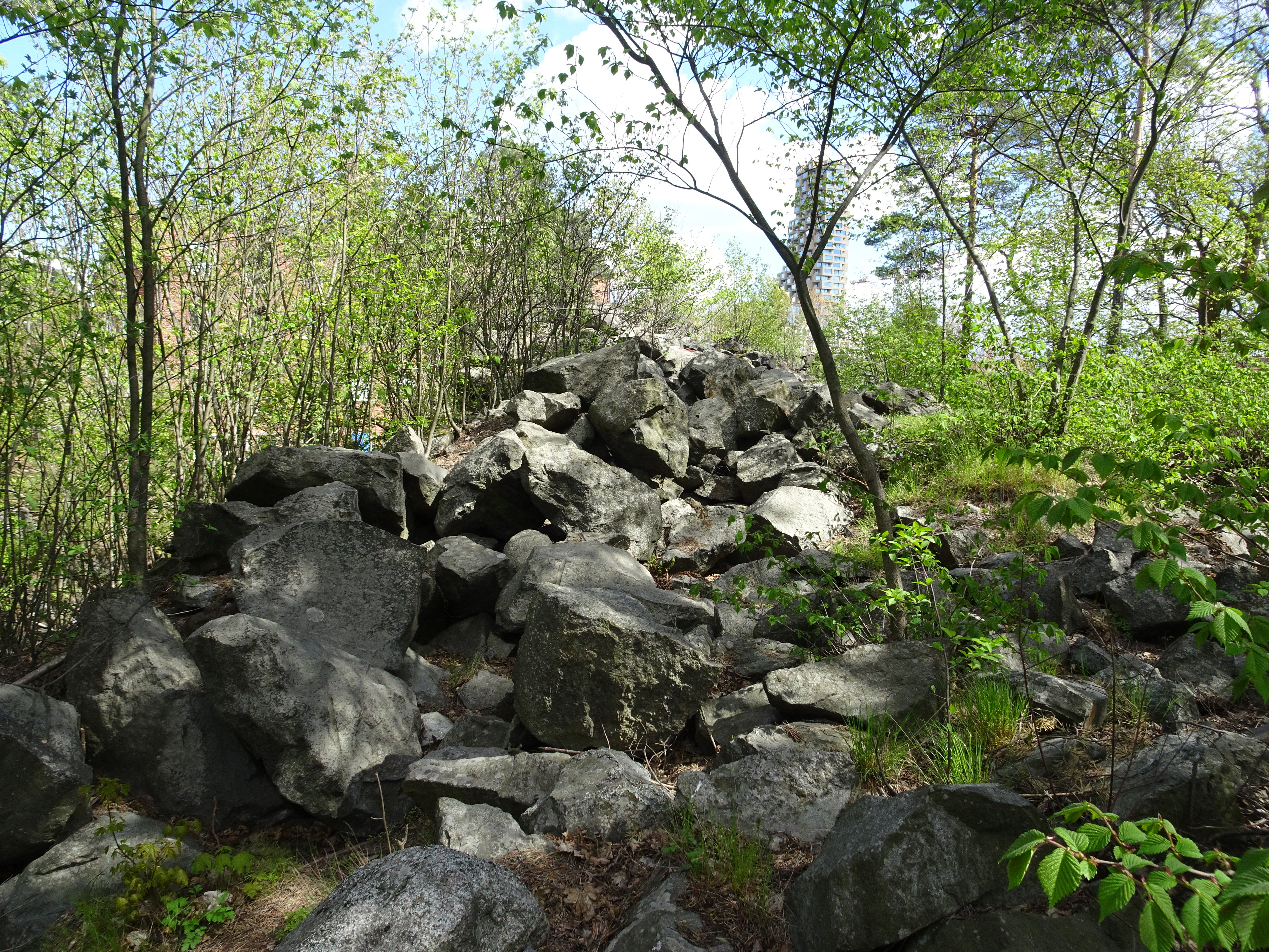 Ryska vallarna (även Ryska muren), Solna, RAÄ-nummer: Solna 57:1, en försvarsanläggning som aldrig färdigställdes.